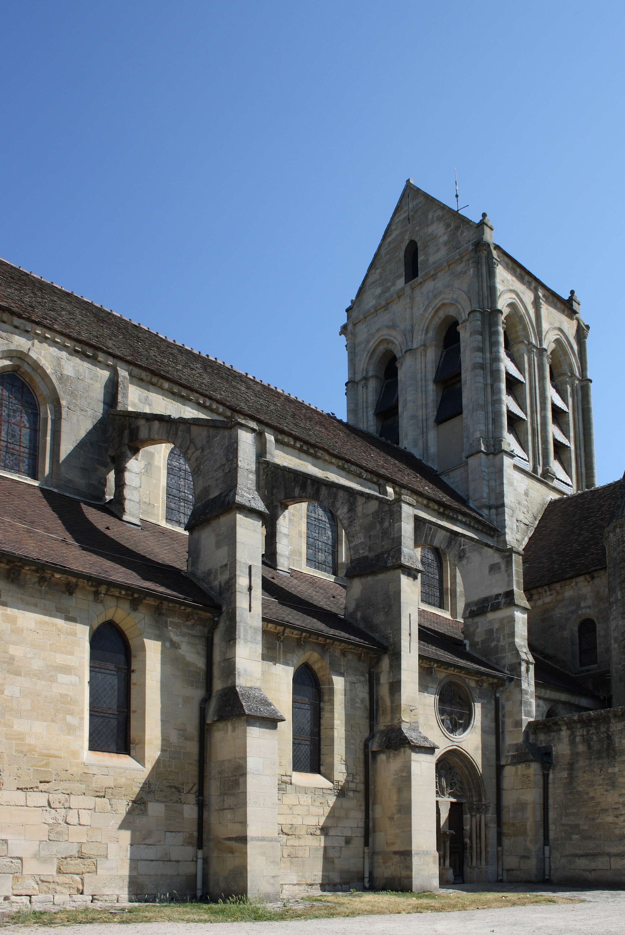 Katholische Pfarrkirche Notre-Dame-de-l'Assomption in Auvers-sur-Oise im Département Val d'Oise (Île de France), erbaut im 12./13. Jahrhundert, Ansicht von Süden